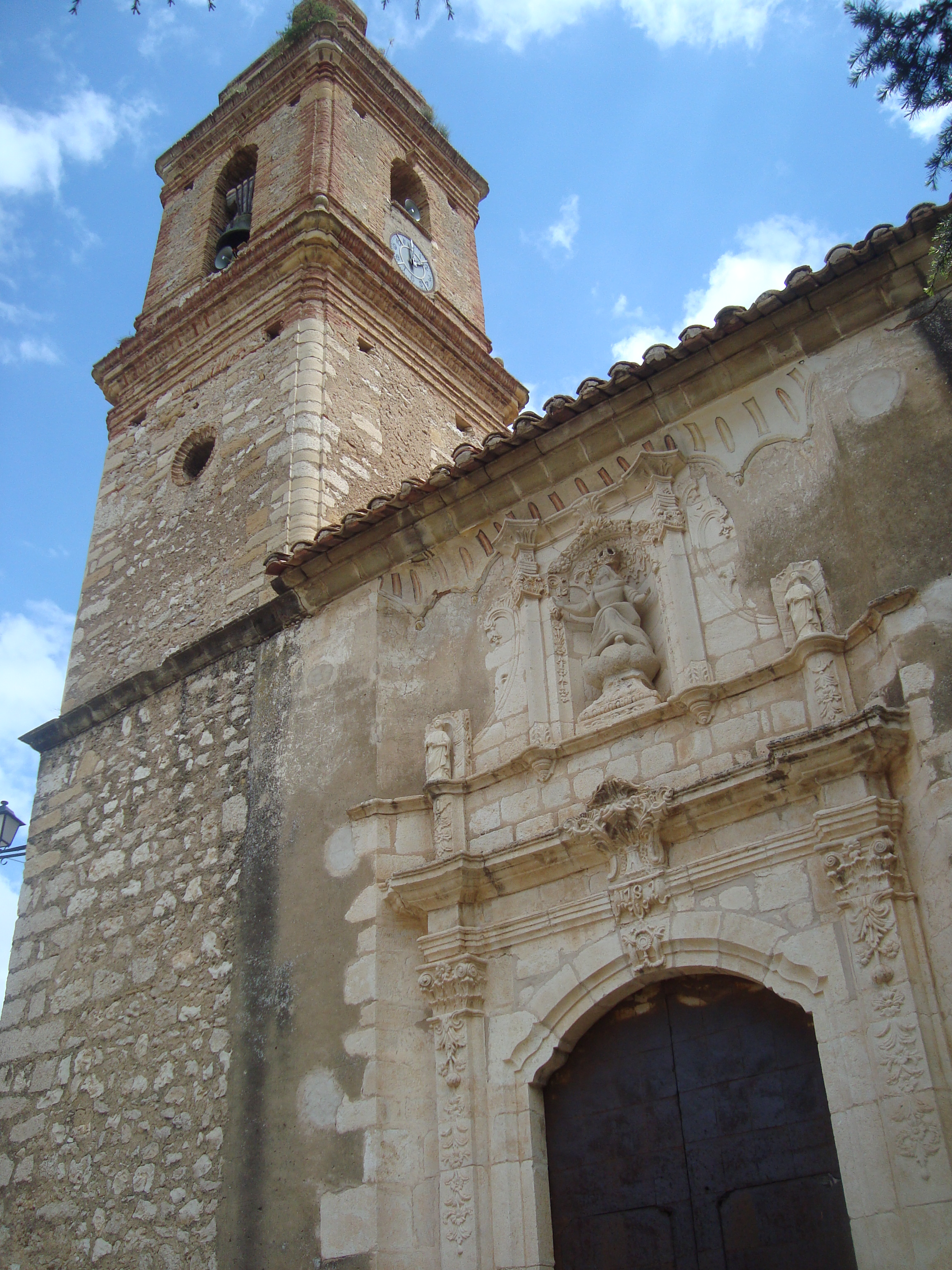 Església parroquial de l'Assumpció (Palanques) 01.087-001.